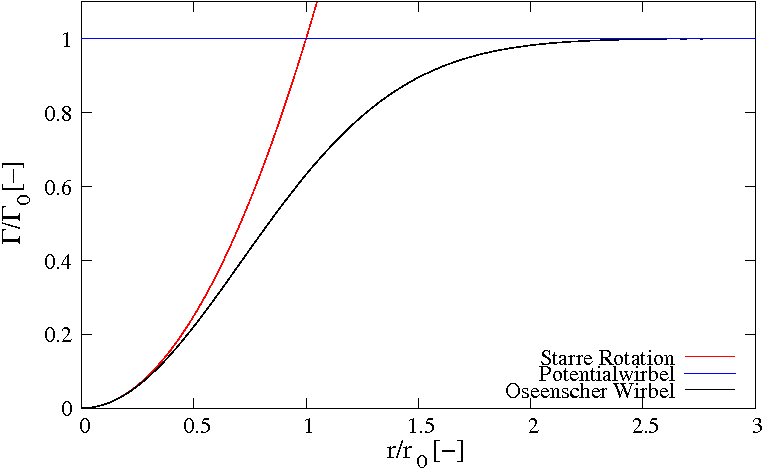 Zirkulationsverlauf im Oseenschen Wirbel